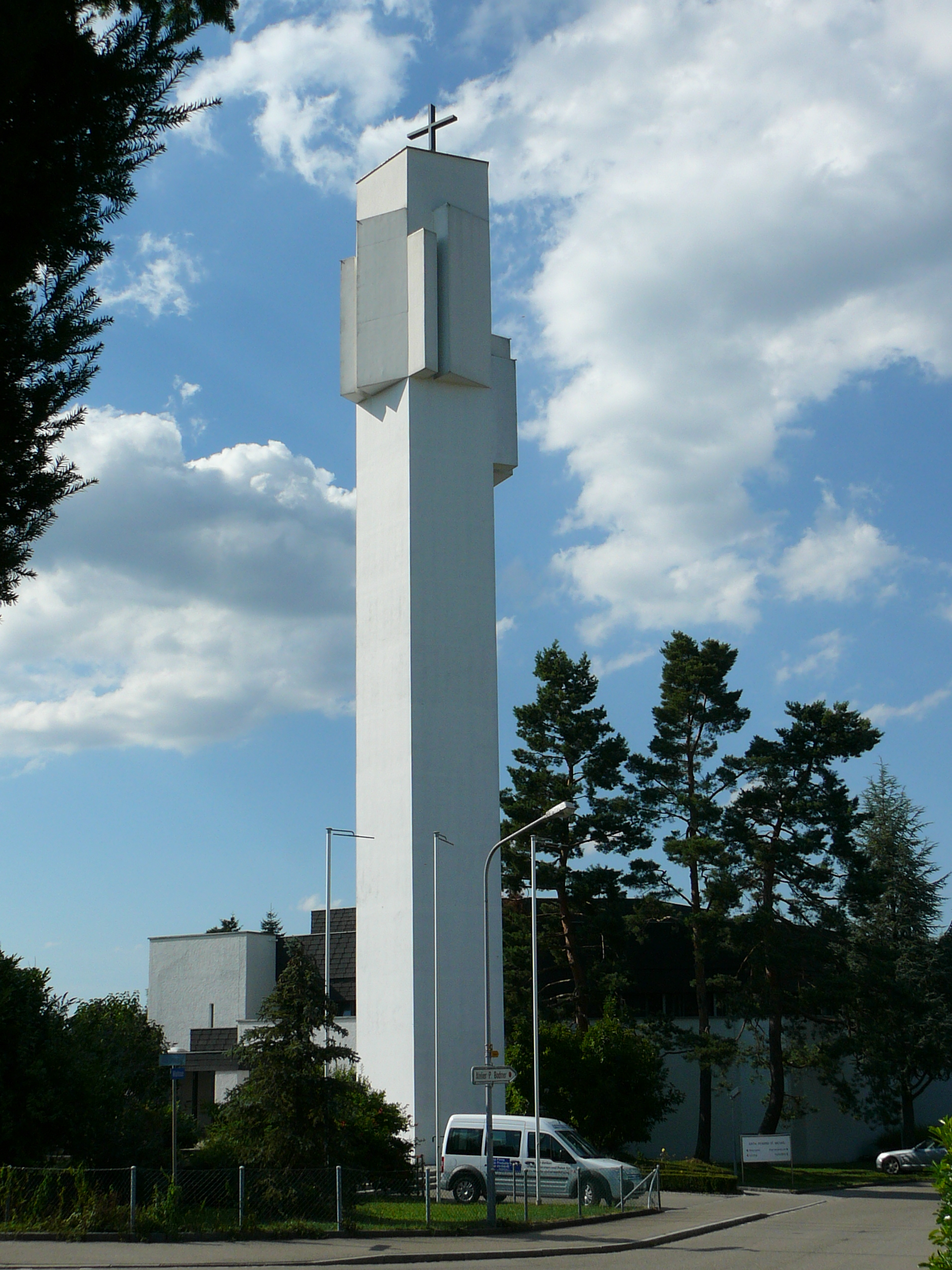 Römisch-katholische Pfarrkirche St. Michael Zollikerberg, Kirchturm von Süden